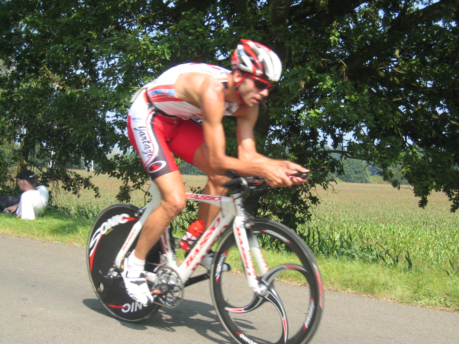 Rob Woestenborghs (Turnhout, 30 augustus 1976) is een Belgische duatleet. Hij behaalde enkele malen het podium bij een grote internationale duatlon.